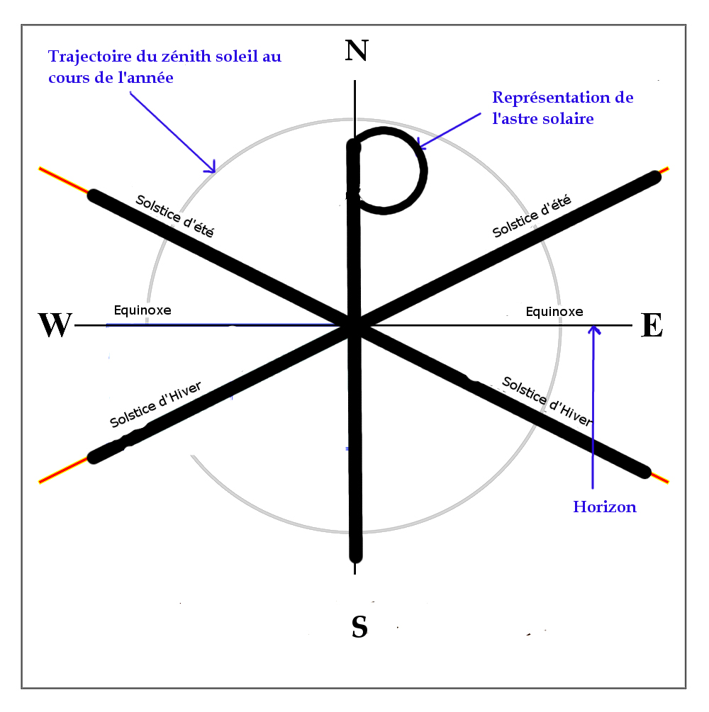 Chrisme / Géométrie Sacrée/ Soleil de Louxor